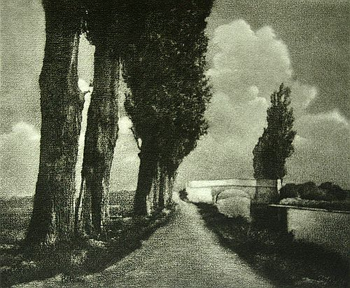 Hugo Henneberg Am Kanal [Die Kunst in der Photographie (Art Folio #6)] 1899